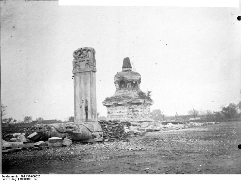 Peking, bei den Boxerunruhen zerstörten Tempel in der Nähe der Verbotenen Stadt. Sinnbild der Unsterblichkeit: Gedenktafel auf steinener Schildkröte